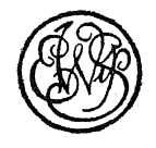 Logo wydawnictwa Edwarda Wendego w książce Mieczysława Rulikowskiego "Zakres i zadania księgoznawstwa", 1916